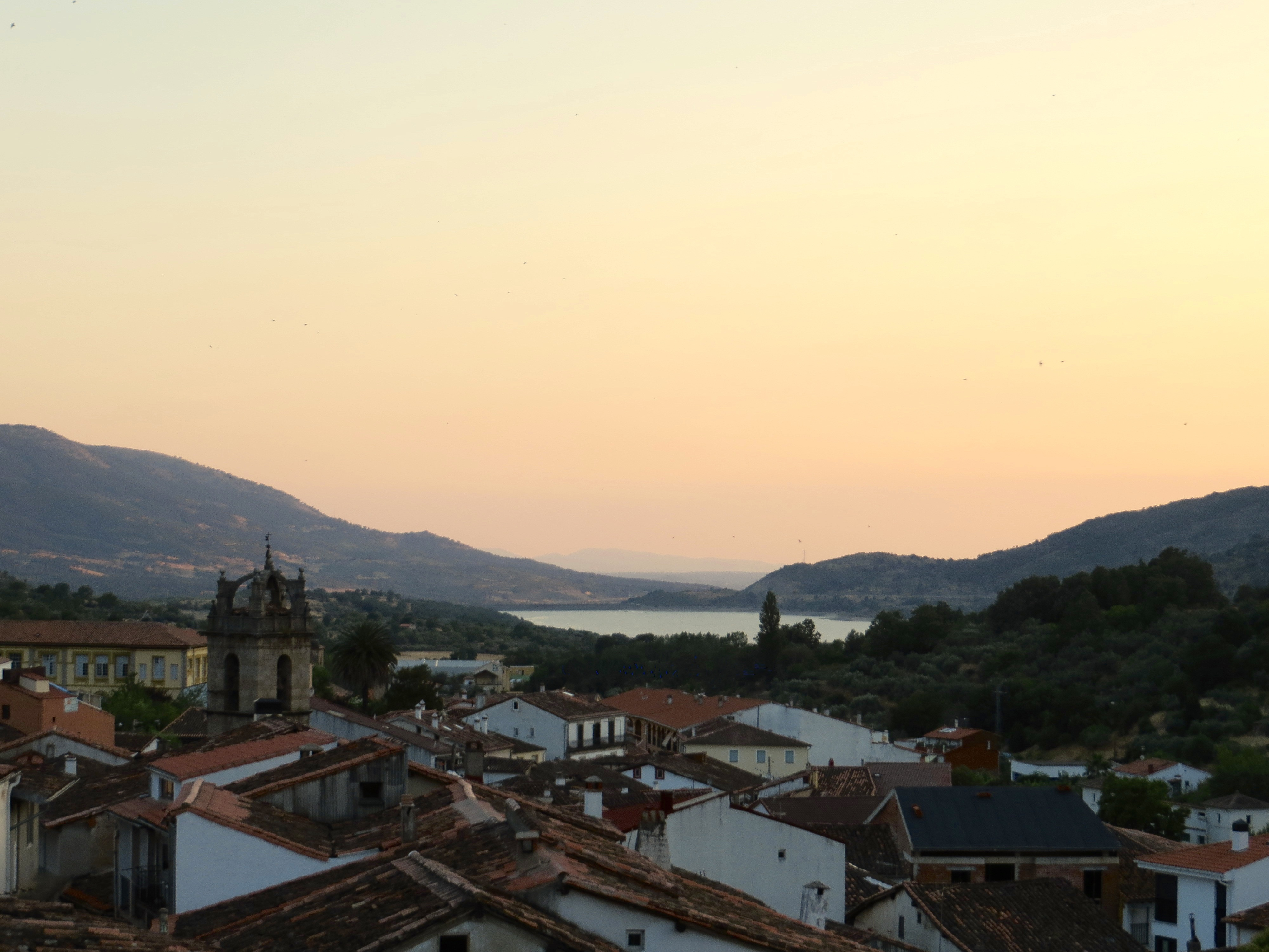 Baños de Montemayor